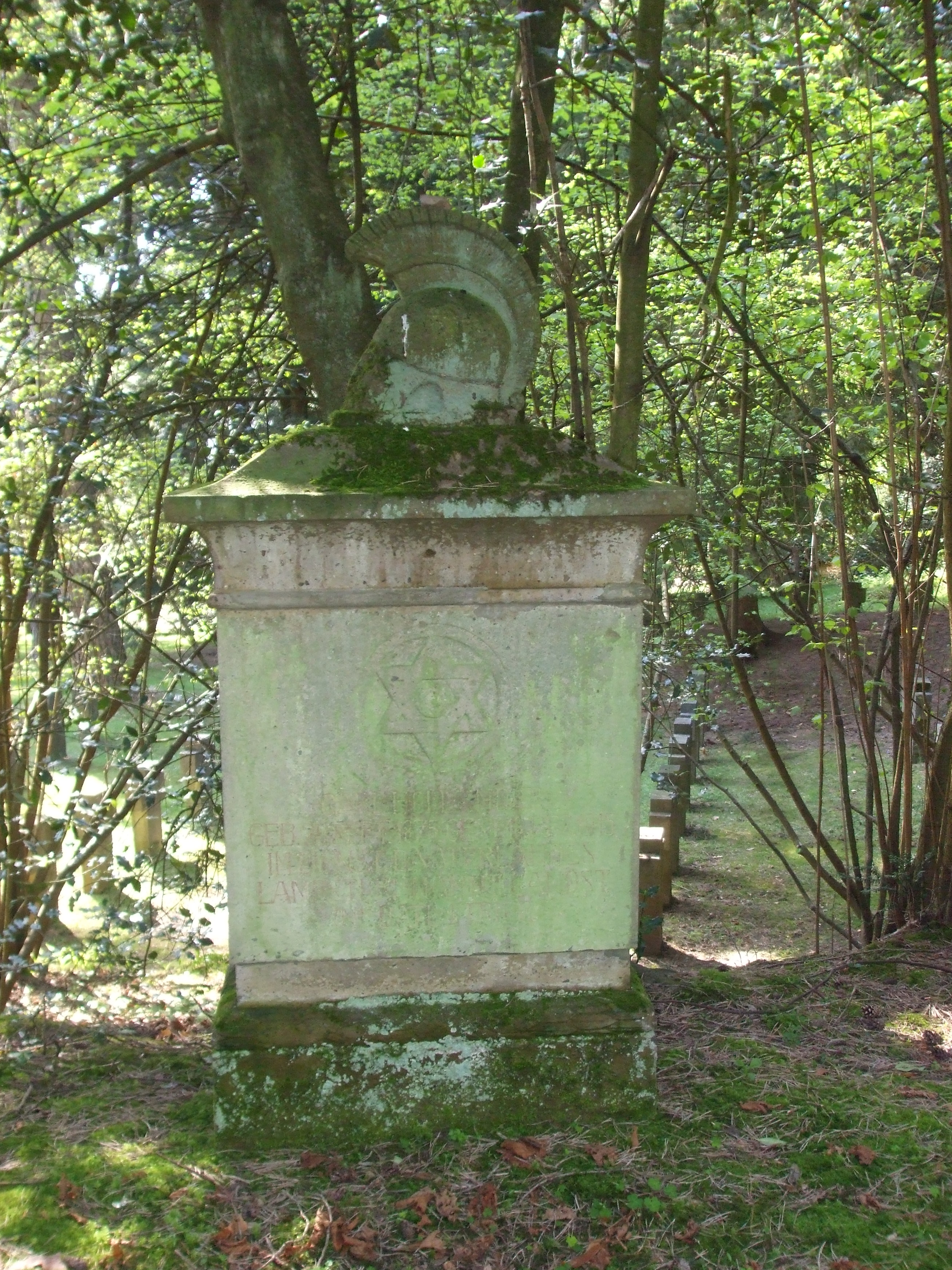 Waldfriedhof Aachen, Gedenkstein für einen jüdischen Gefallenen des 1. Weltkrieges, mit Darstellung eines Davidsterns